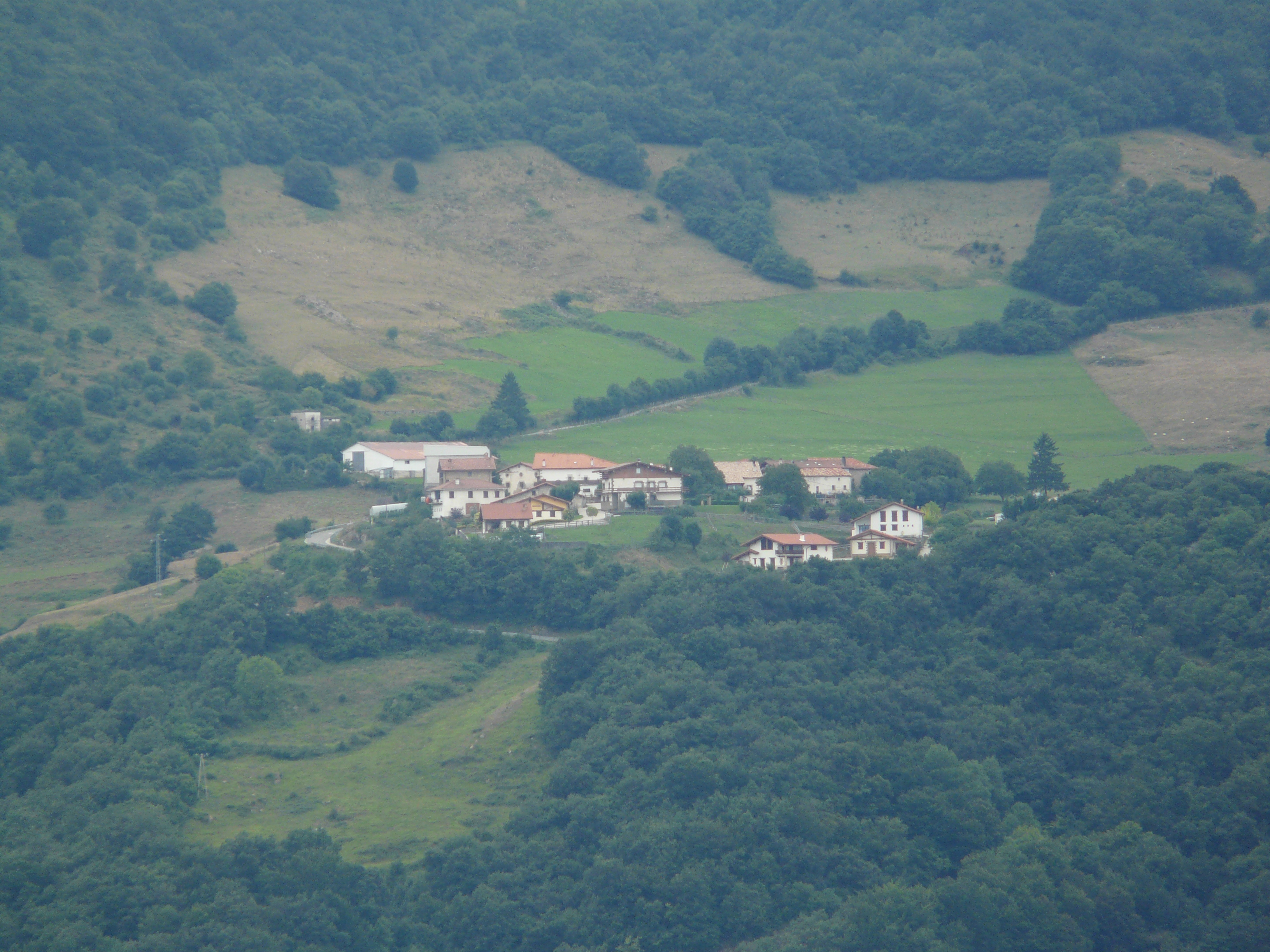 Goldaratz vist des de Zarrantz (Imotz).